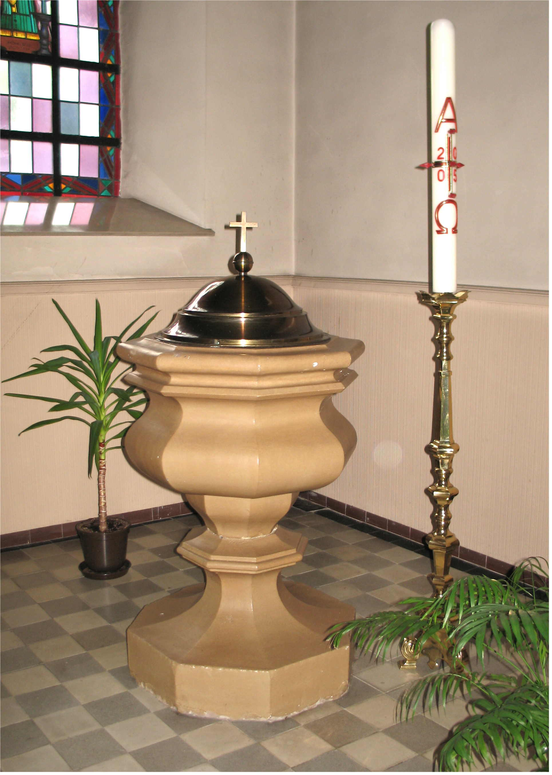 Sujet : Daafkapell an der Kopleschter Kierch (Abrëll 2006)